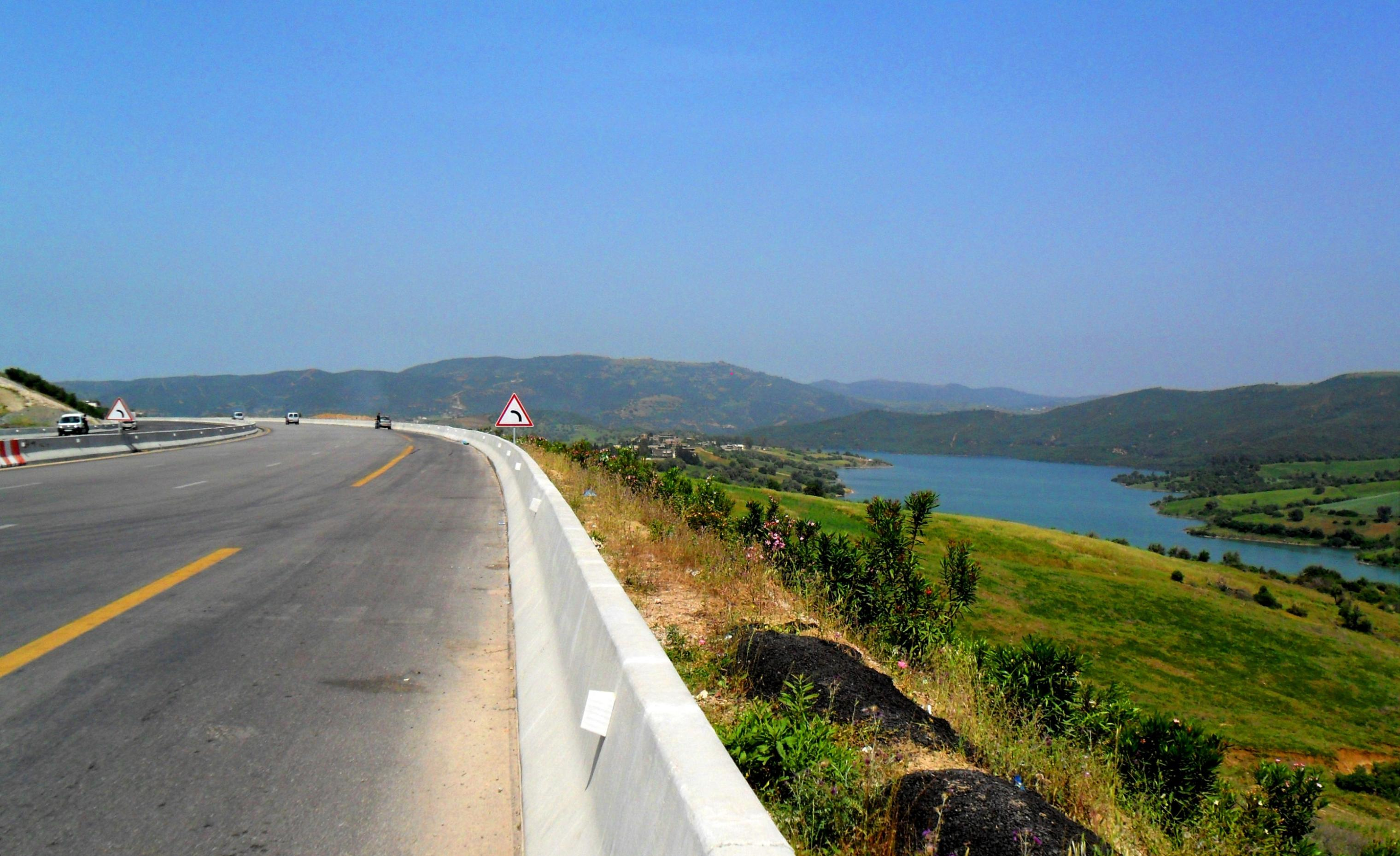 barrage de Keddara سد قدارة